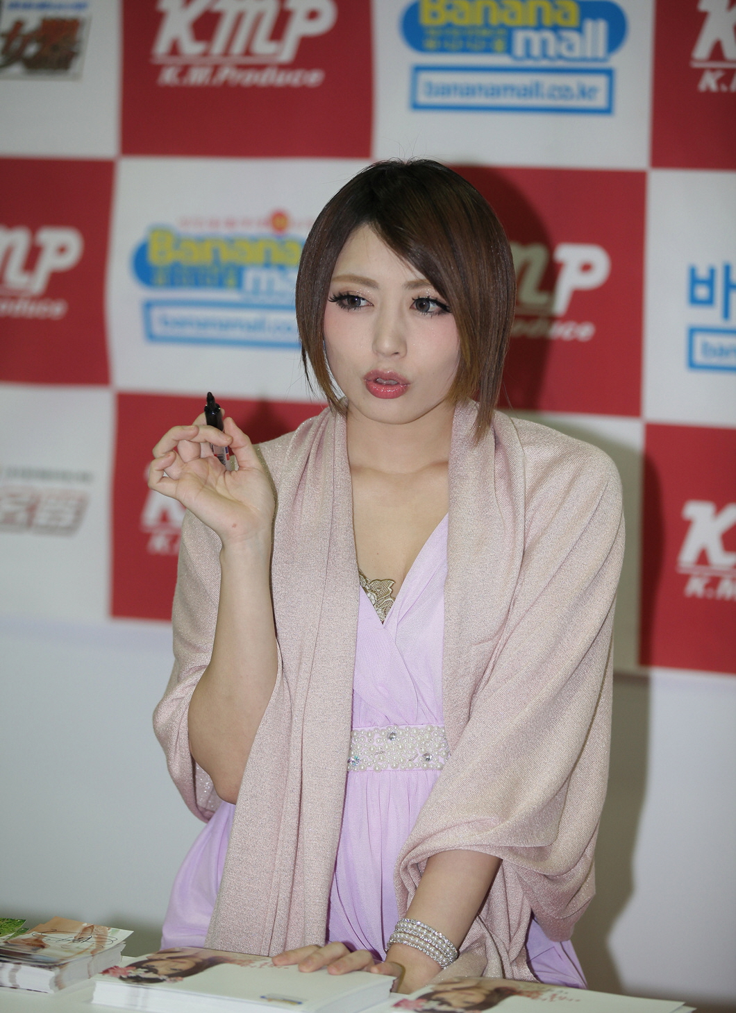 사쿠라이 아유(AYU SAKURAI) 팬싸인회 in 맨즈쇼